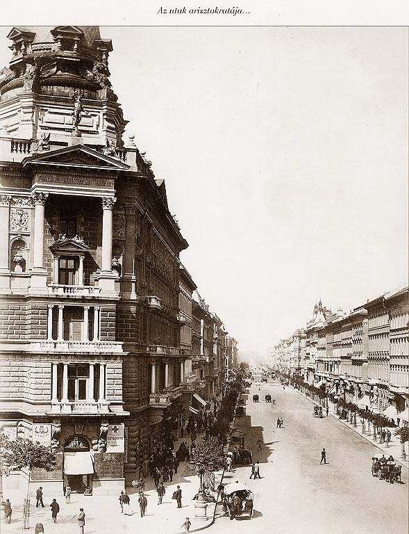 Andrássy út eleje, Bajcsy-Zsilinszky út sarka.